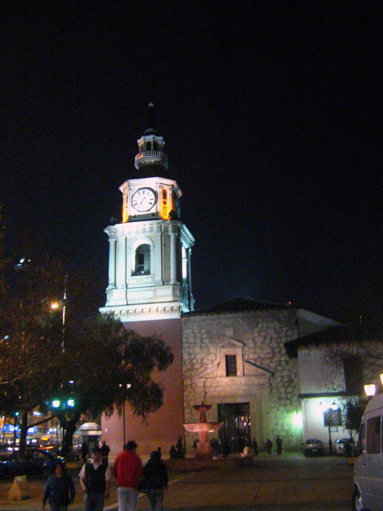 La iglesia y convento de San Francisco, en Santiago de Chilesan francisco